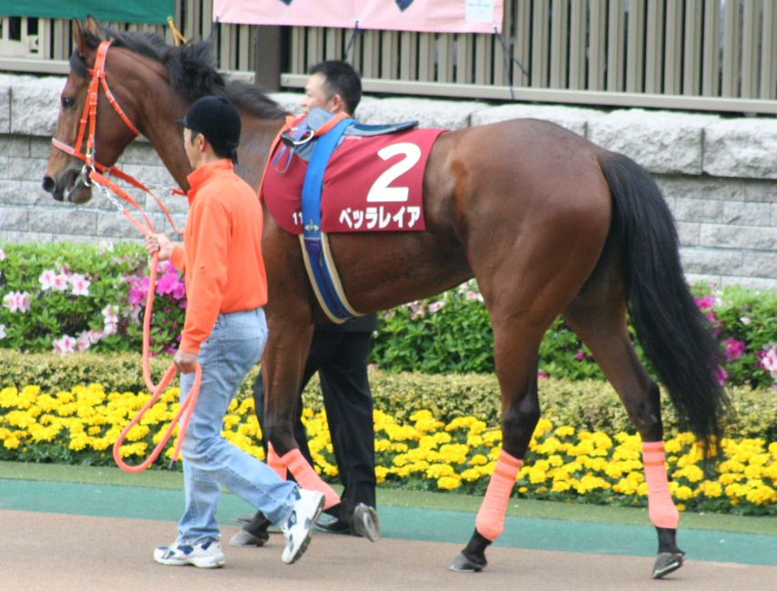 Bella Rheia(horse)